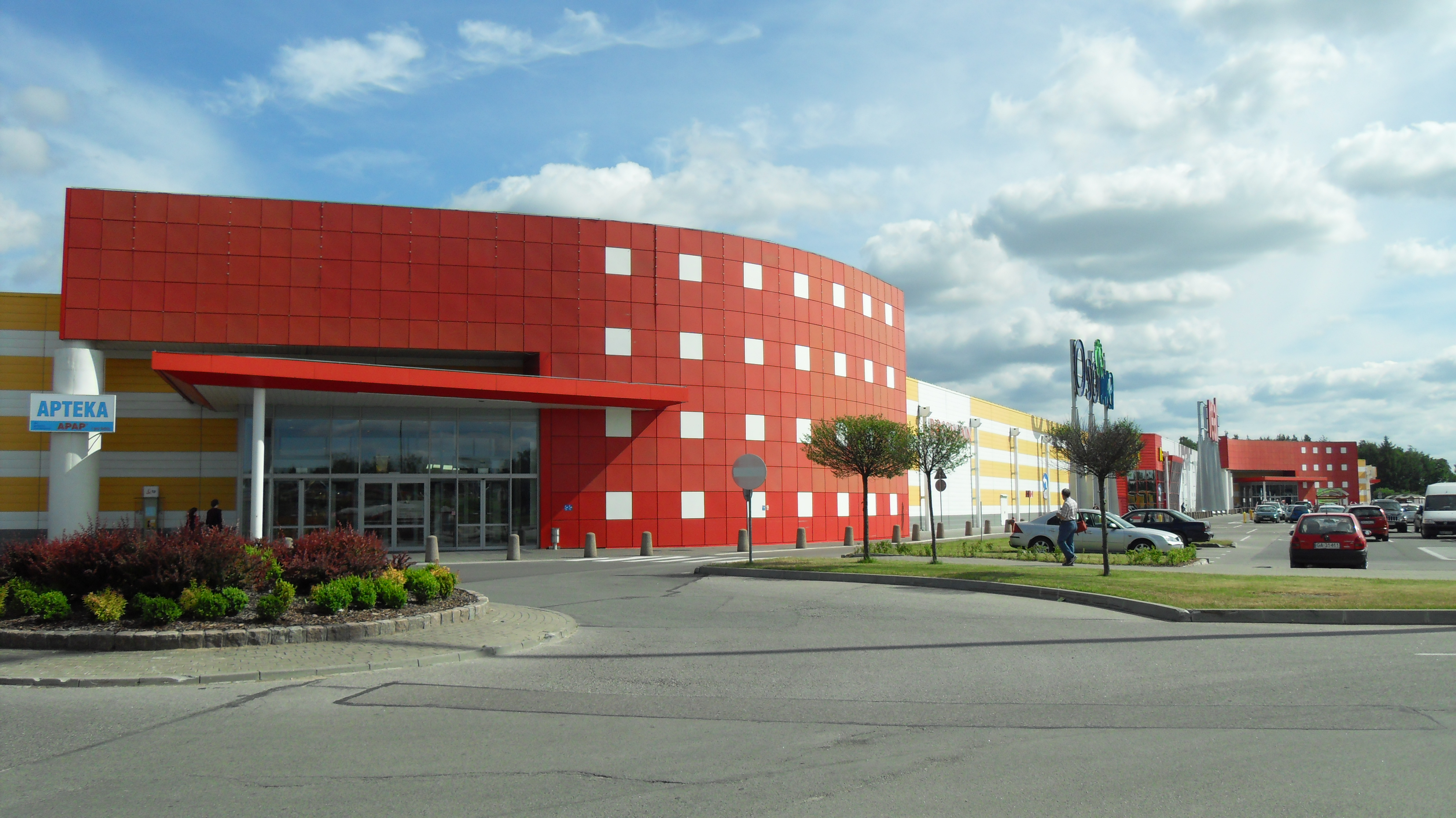 Gdańsk Osowa. Centrum Handlowe Osowa, ul. Spacerowa 48.